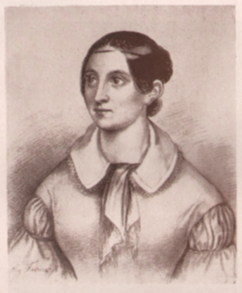 Bildnis der Goethe-Freundin Angelica Facius (1806-1887). Das Original befand sich 1937 im Dresdner Kupferstichkabinett.